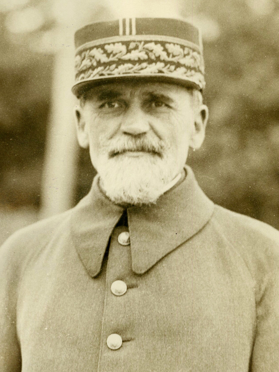 "Général Ferrié hospitalisé (Février 1932)" Photo originale G. DEVRED / Agce ROL